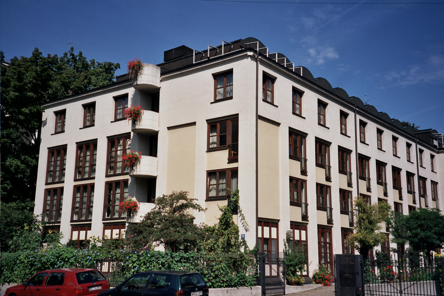 Priesterseminar München, Hausansicht